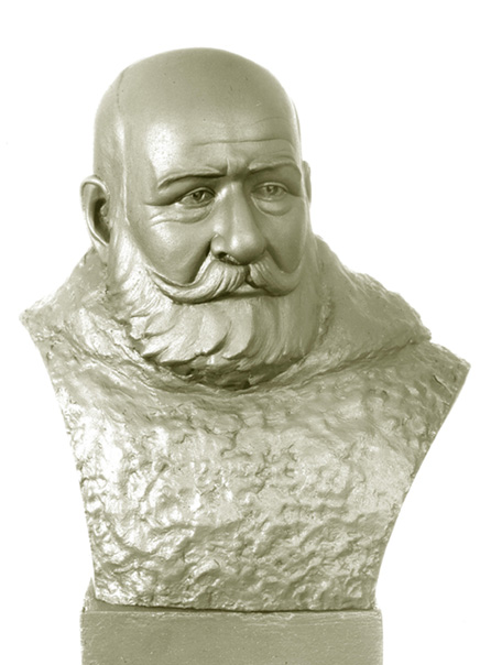 Никифор Бегичев, исследователь Заполярья (1874-1928 г.г.). Скульптурная реконструкция по черепу С.А. Никитина, 1974. Nikifor Begichev, Forensic facial reconstruction by S.A.Nikitin.